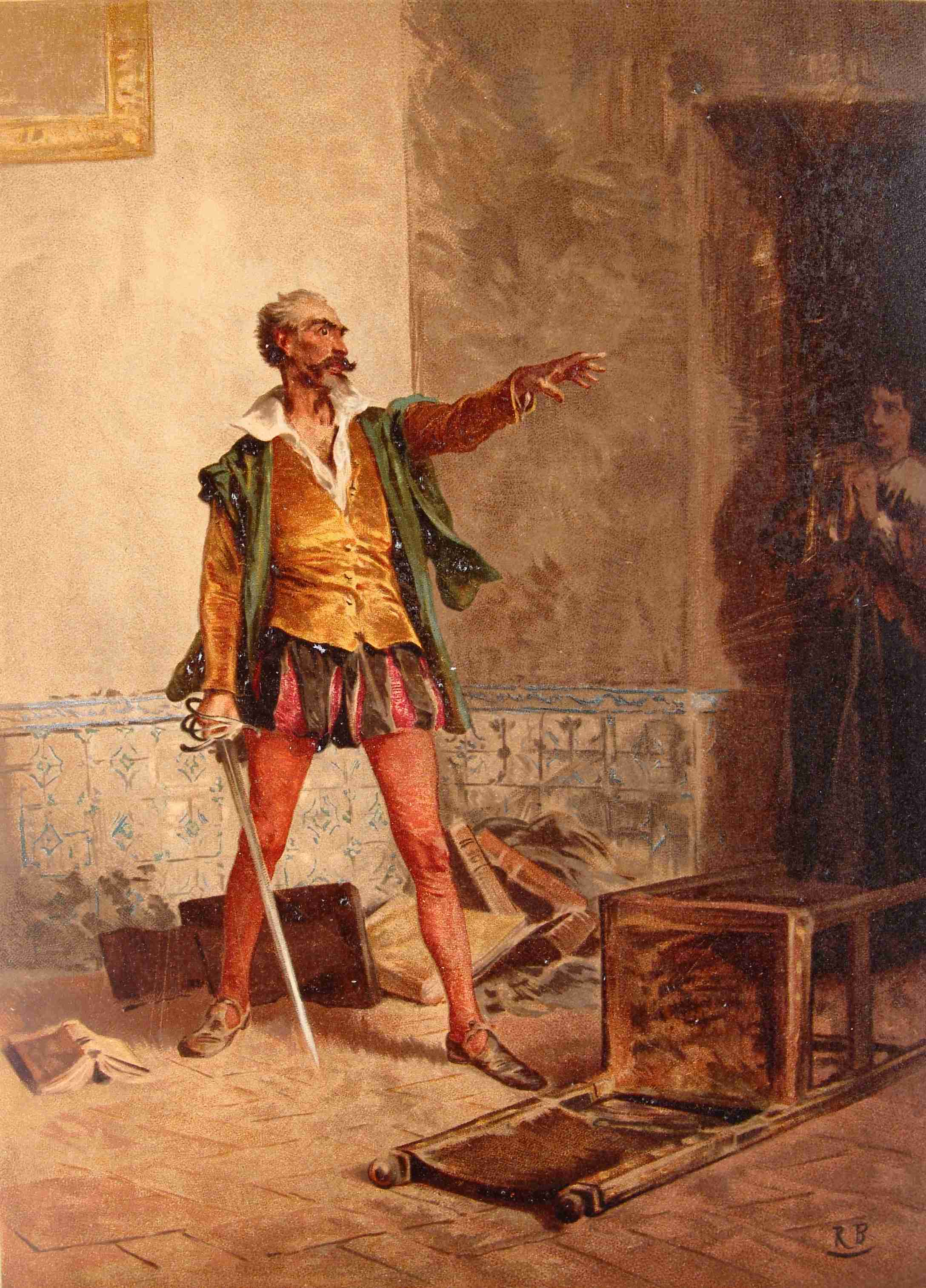 202_017_quijote_cap05